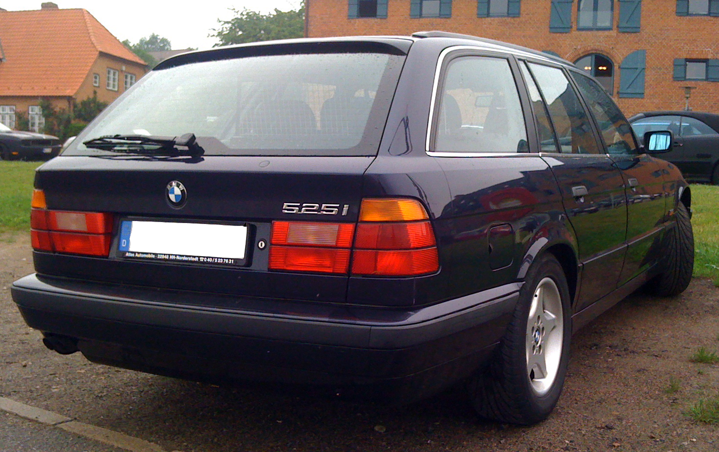 Heckansicht eines 96er 525i Touring Edition in Orientblau Metallic.